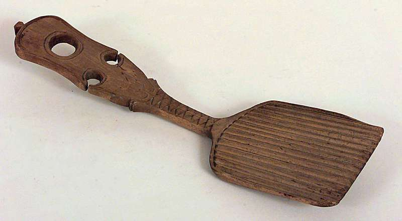 Smørskje fra Oppland skåret i bjørk. Lende 30.4 cm. Foto: Anne-Lise Reinsfelt / Norsk Folkemuseum, NF.1919-0089.